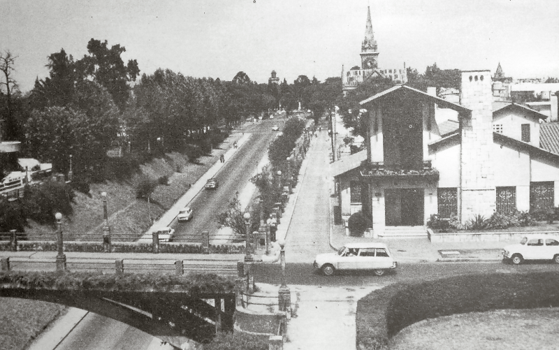 Vista de la Bajada Puccio en 1971.